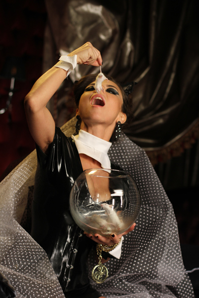 Анна Плетнёва. Съёмки клипа Роман